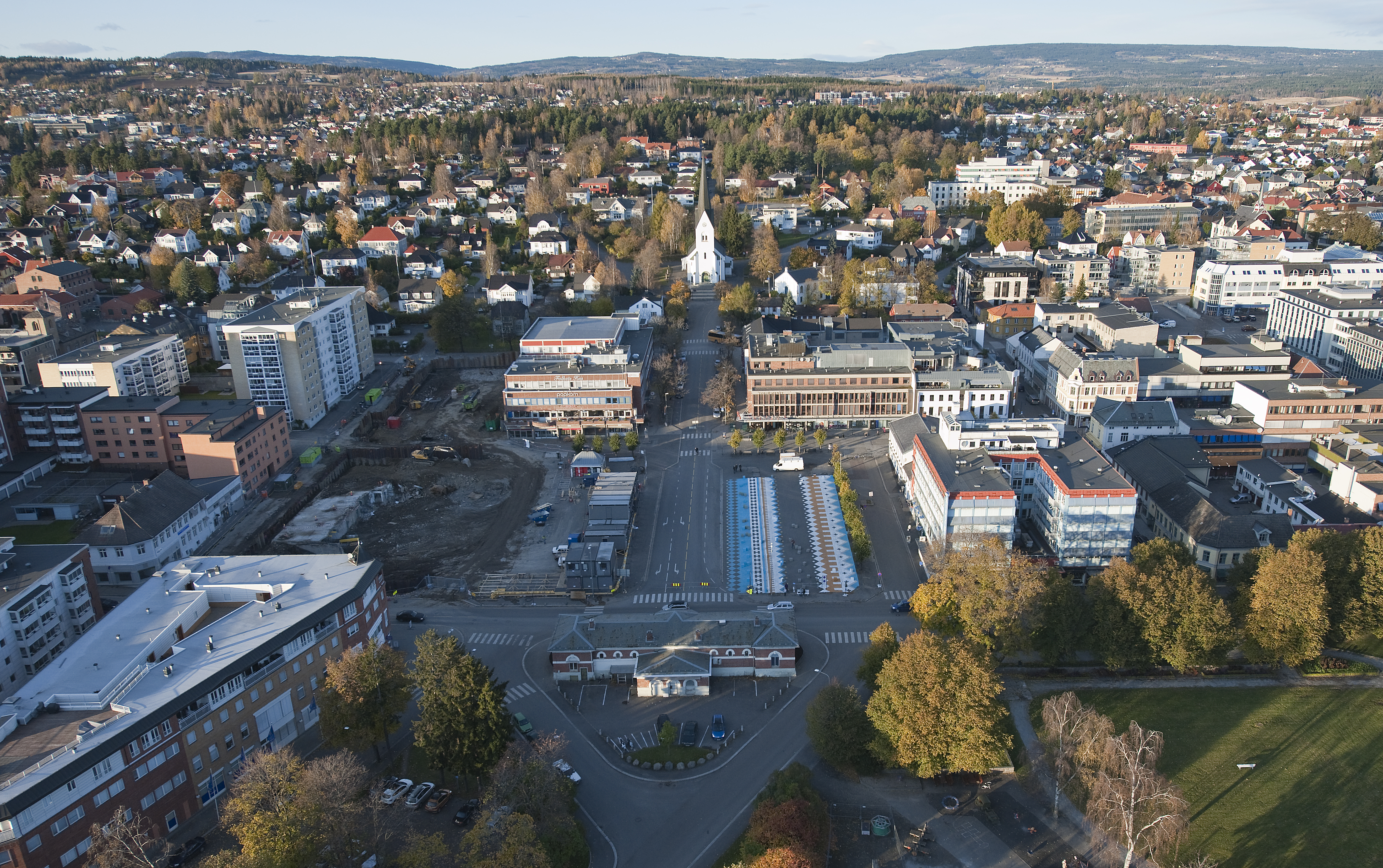 (photo: Christoffer Horsfjord Nilsen)